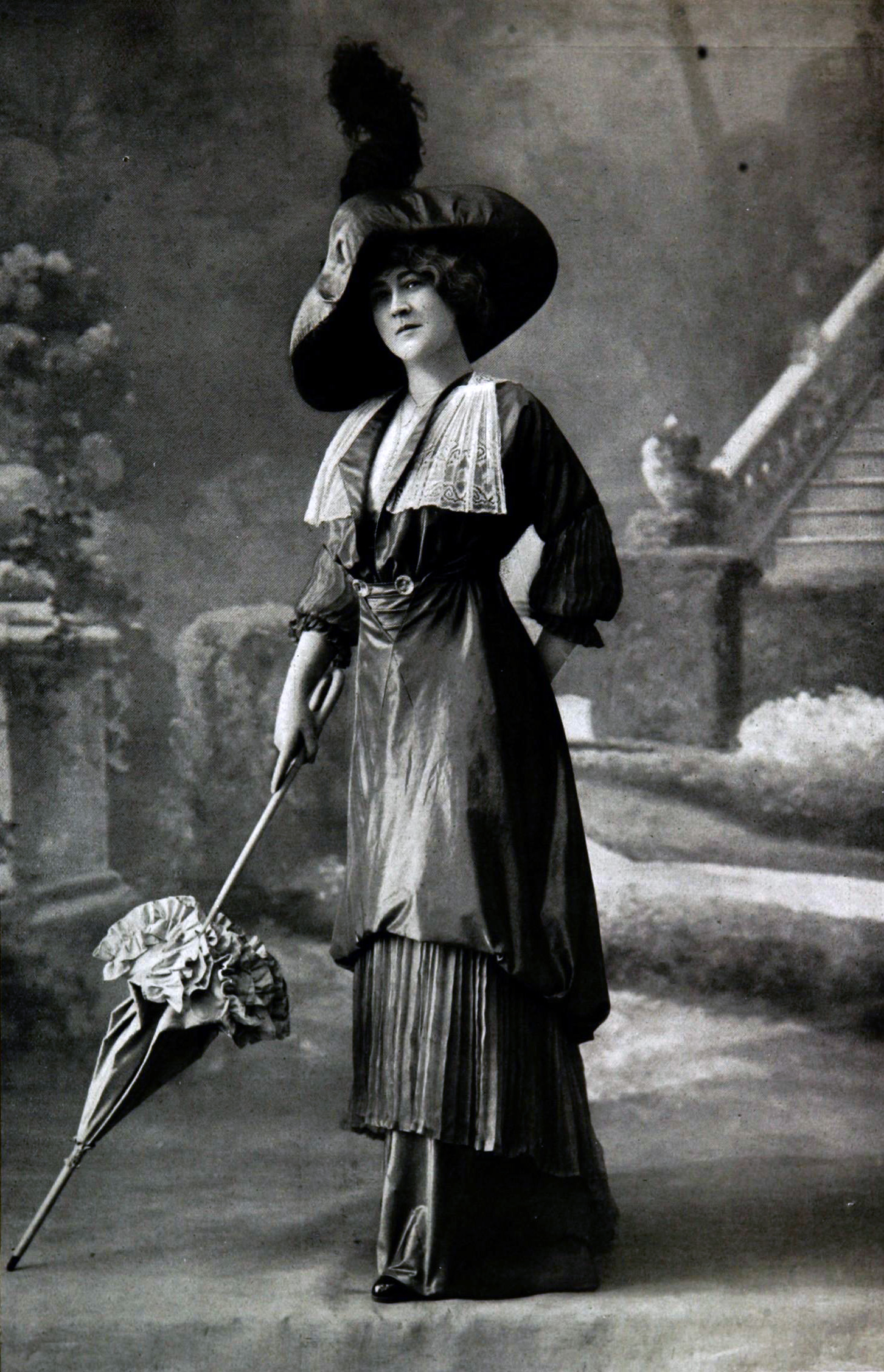 " Robe de taffetas changeant simulant un retroussis sur un volant de mousseline plissée de deux tons. Barbe de malines de chaque côté du devant du corsage". Les Modes : Revue mensuelle illustrée des arts décoratifs appliqués à la femme